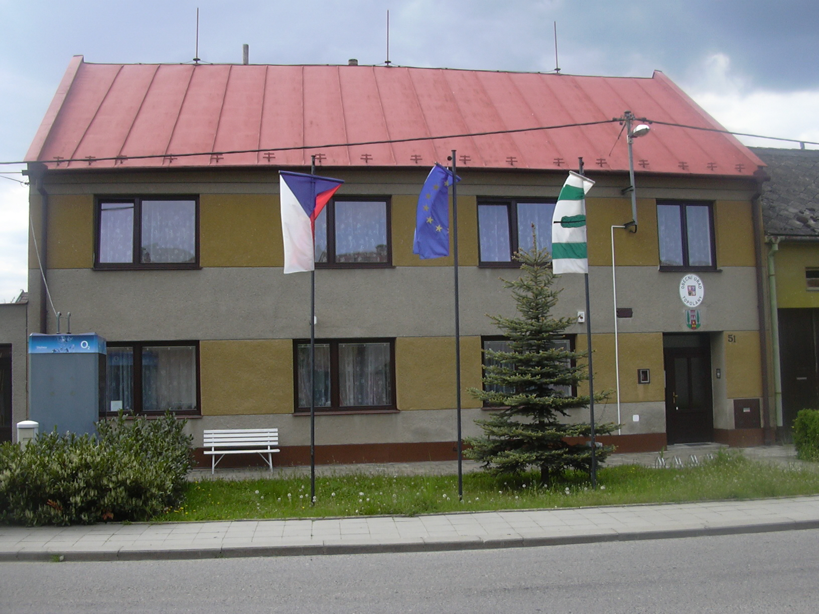 obecní úřad Topolany (Vyškov- Czech republic)